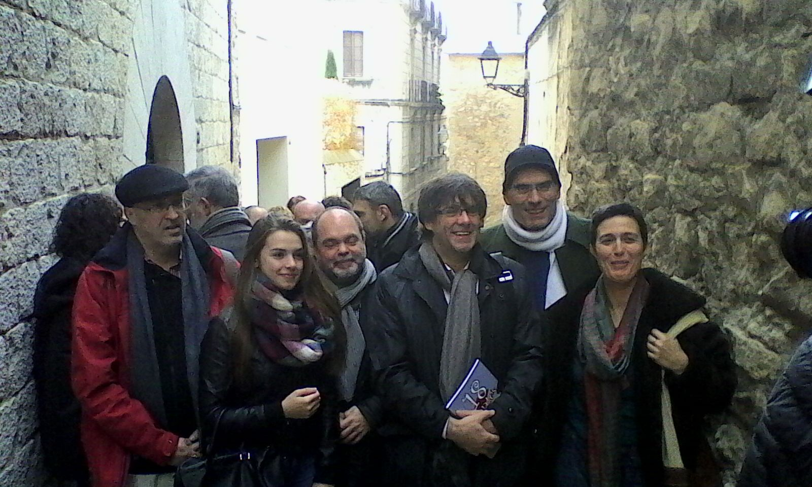 Foto institucional en homenatge a Toni Julià a Girona i a l'Escola d'Educadors Especialitzats de Girona (12-12-2015)